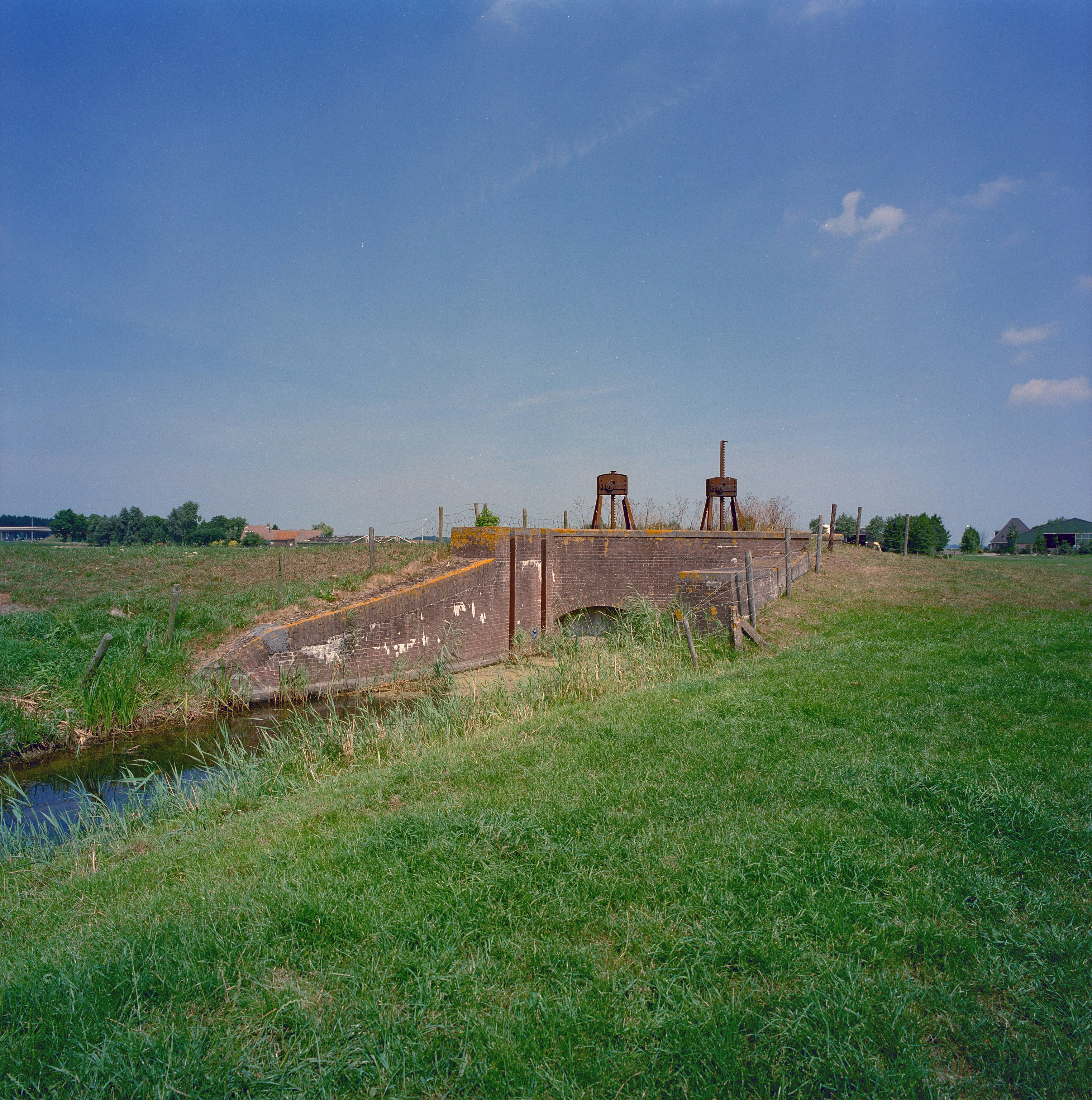 Fort Veldhuis: Inundatieduiker in de inundatiekering ten westen van fort Veldhuis